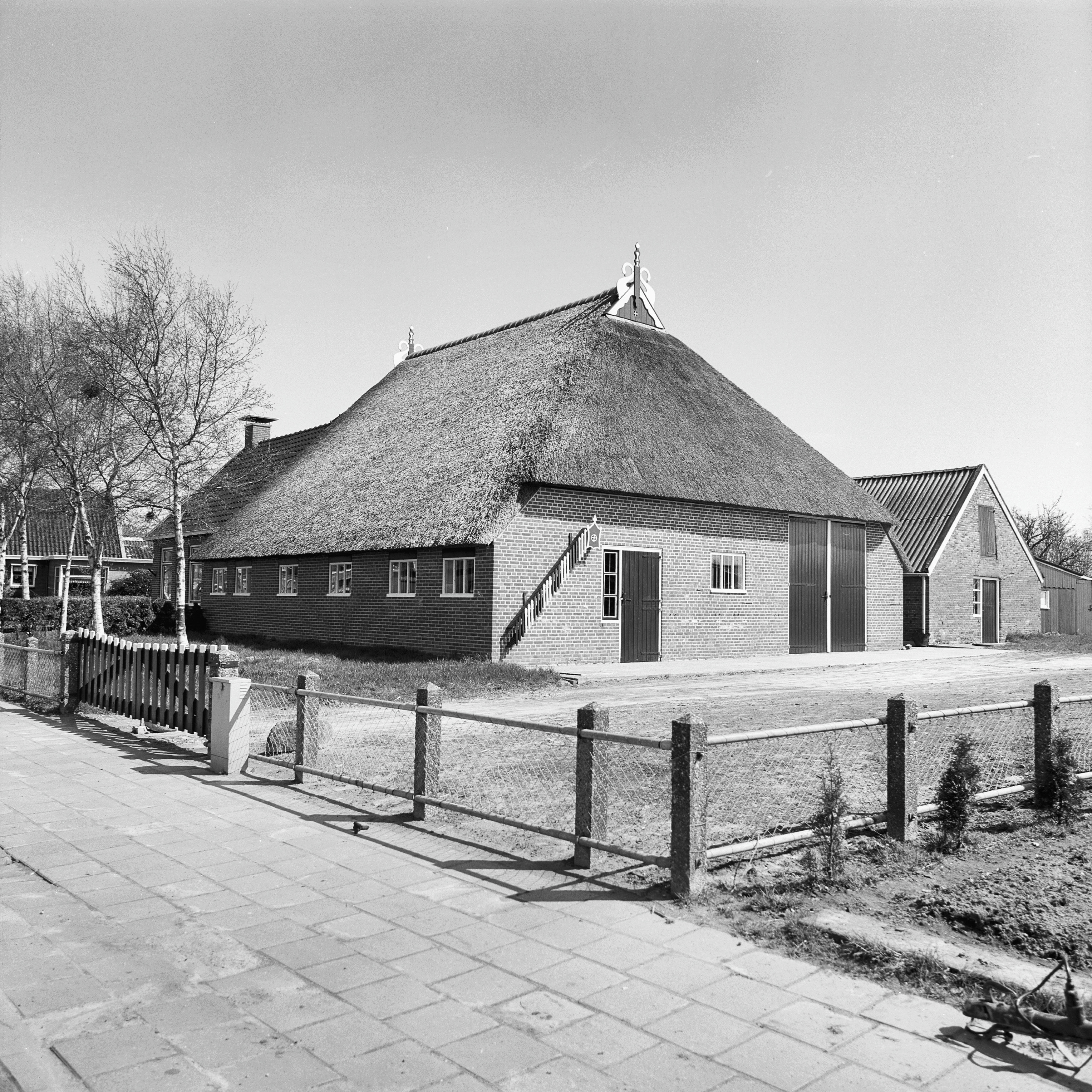 Exterieur OVERZICHT